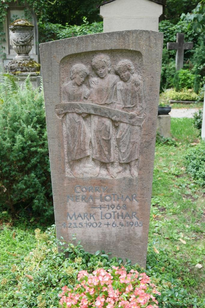 Grab des Komponisten Mark Lothar, 1902-1985, auf dem Alten Friedhof München-Solln, Friedhofweg 1